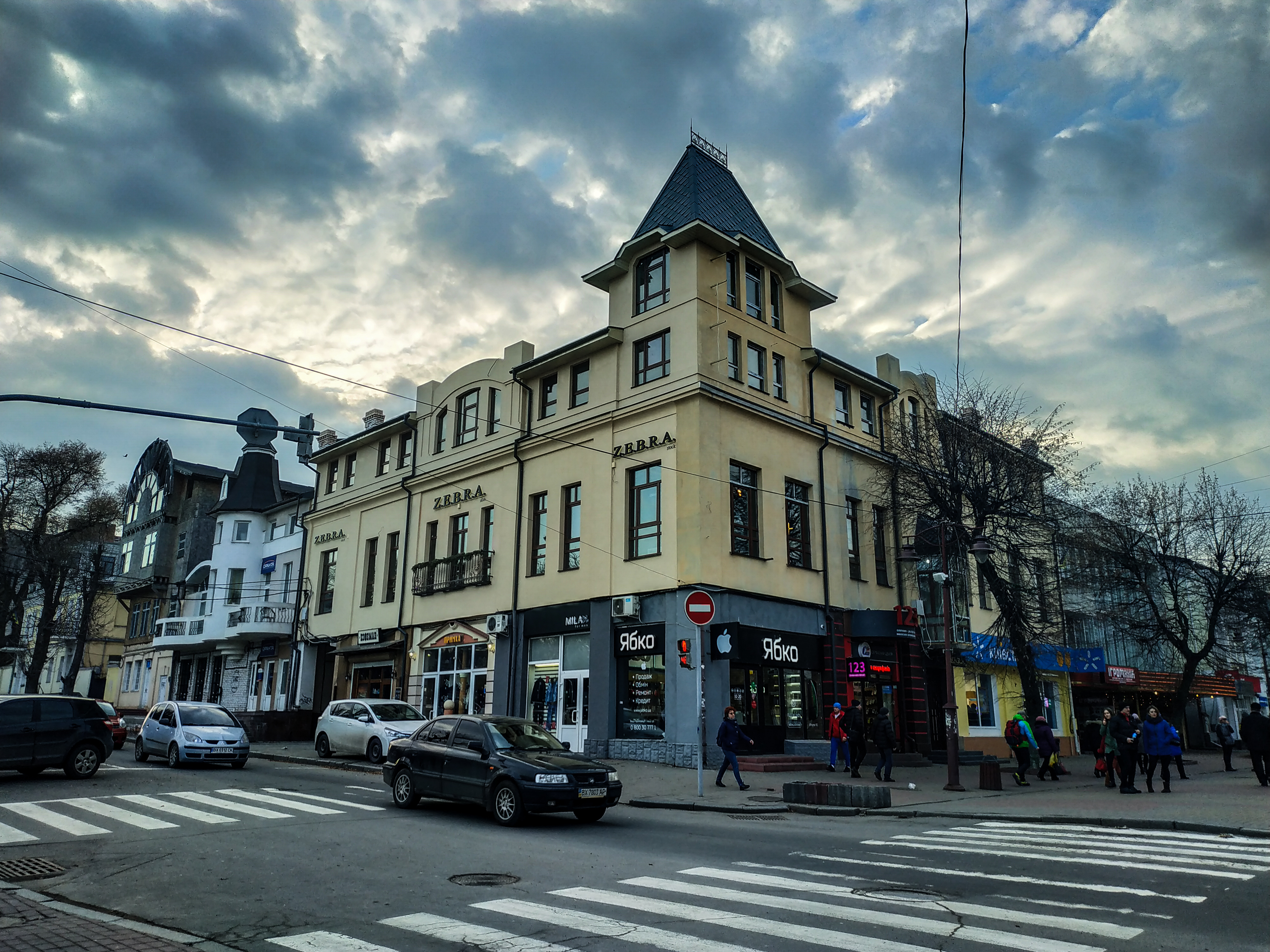 Rekonstruita domo sur la angulo de Proskurivska kaj Hrushevsky-stratoj